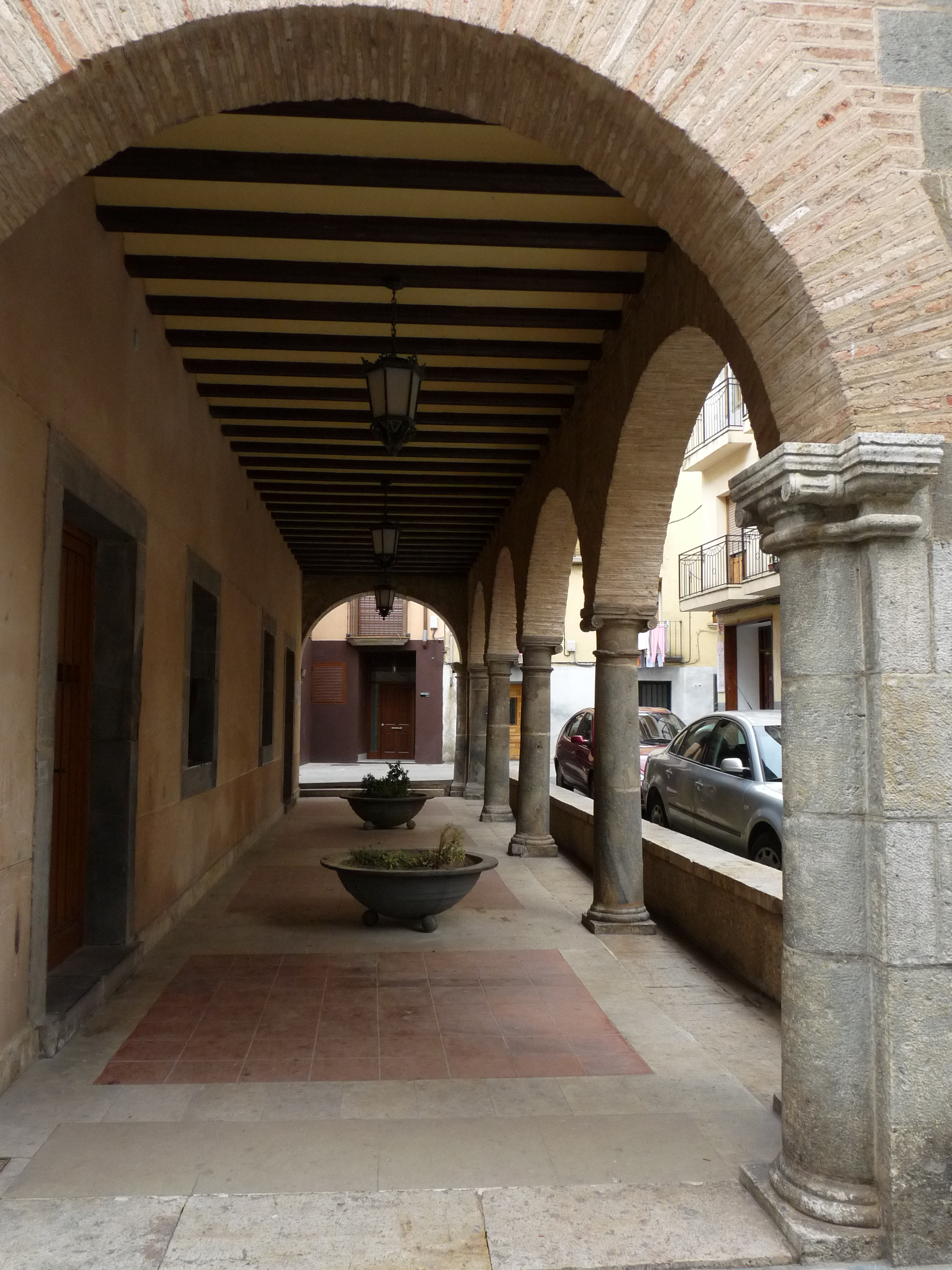 Ágreda - Ayuntamiento (s. XVI) - Arcada posterior